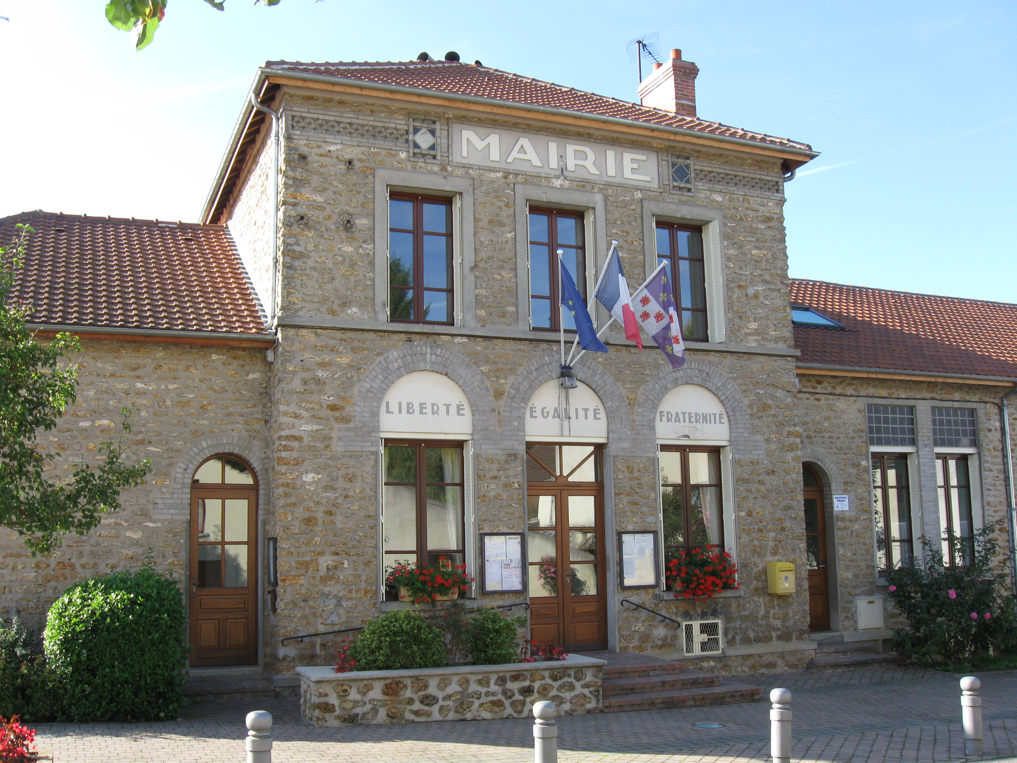 Mairie de Villiers-Saint-Denis. (département de l'Aisne, région Picardie).